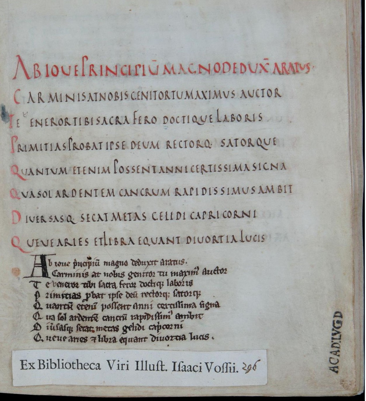 Fol. 2r